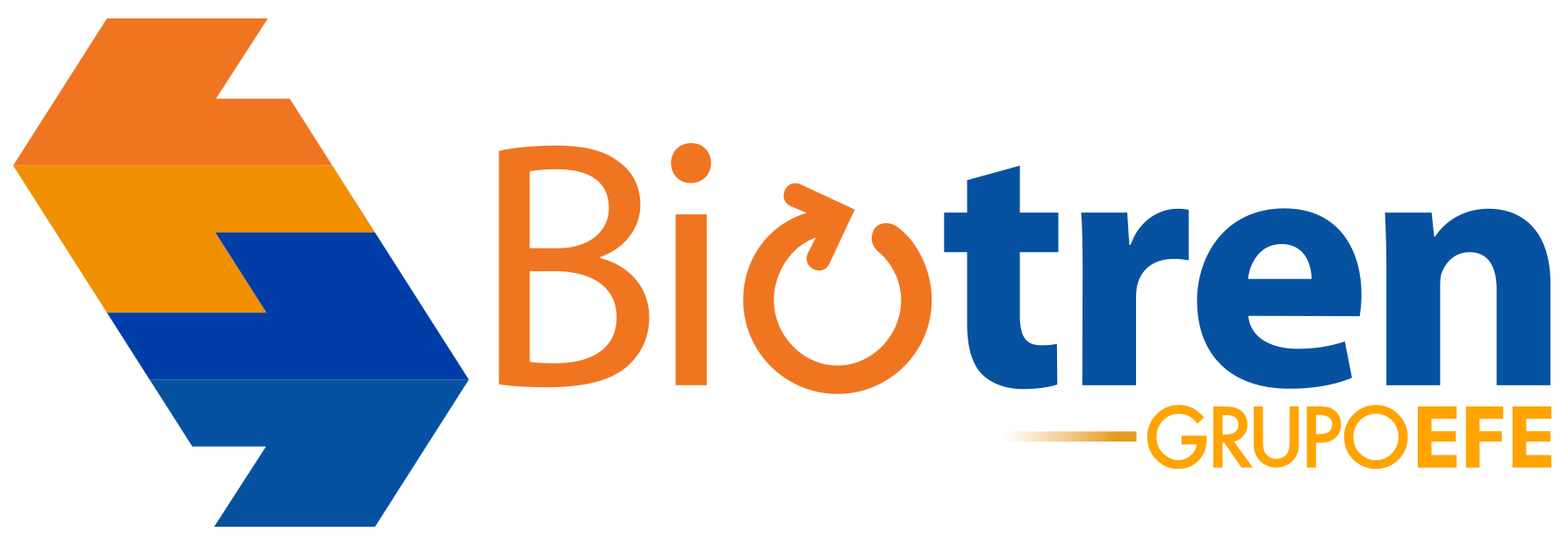 Logo BT 2015